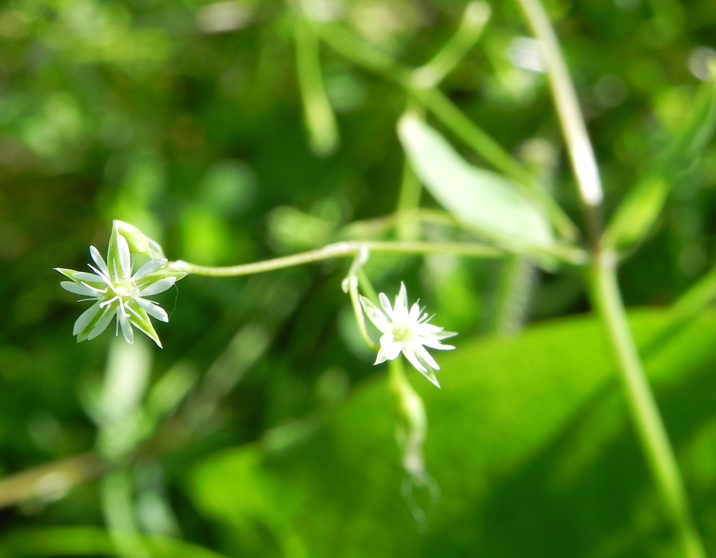 Bach-Sternmiere (Stellaria alsine), auch Quell-Sternmiere an der Örtze, im Naturpark Südheide, Niedersachsen, Germany